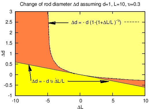 התרשים המקורי מהוויקיפדיה באנגלית Rod diamater change poisson.png י.ש. 10:31, 27 בדצמבר 2006 (IST) השוואה בין ביטוי מדויק לבין ביטוי מקורב בחישוב שינוי קוטר מוט במתיחה. רישיון נוצר על ידי , נערך על ידי משתמש:י.ש.